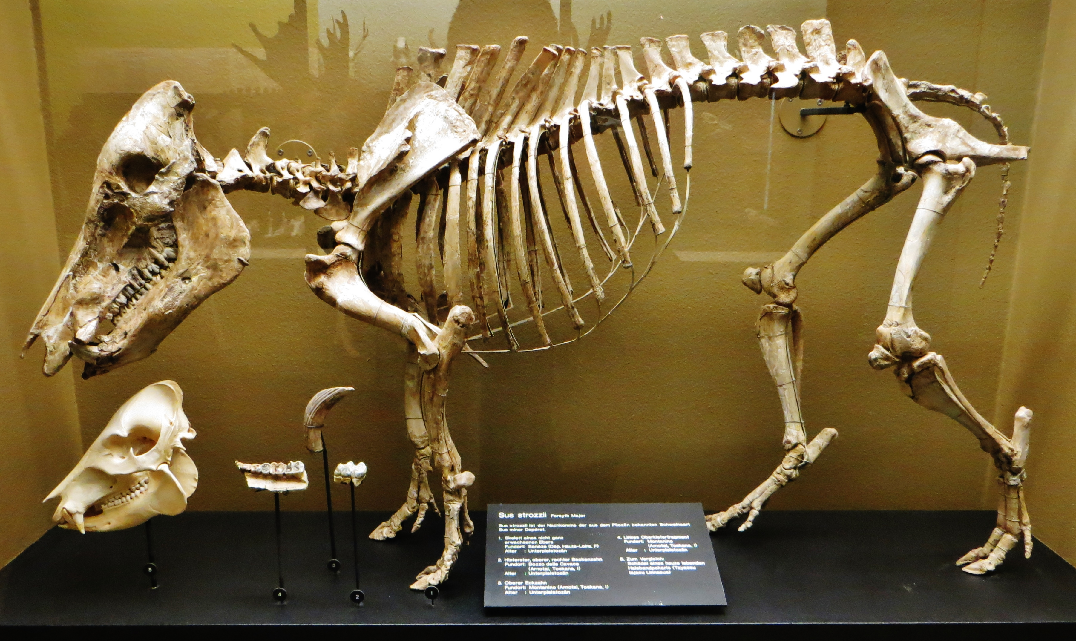 Fossil of Sus- Took the picture at Natural History Museum, Basel